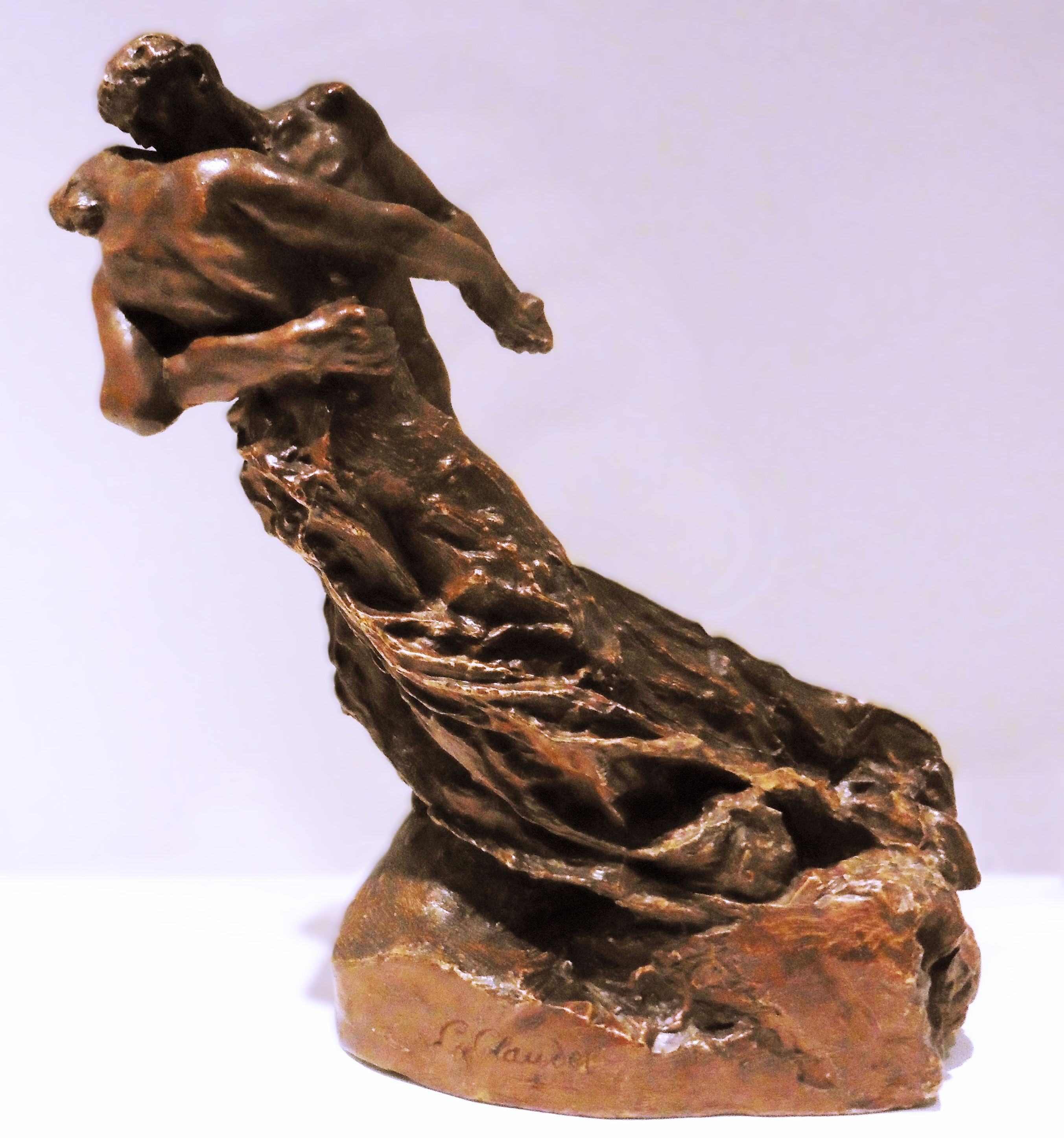 Camille Claudel, "La Valse" bronze, (1889-1905) Musée d'Art et d'Industrie de Roubaix dit "la Piscine", Roubaix, France. Camille Claudel (1864–1943) DescriptionFrench sculptor and graphic designerDate of birth/death 8 December 1864 19 October 1943Location of birth/death Fère-en-Tardenois AvignonWork location Paris (1883)Authority control : Q120582 VIAF: 66585142 ISNI: 0000 0001 2137 4309 ULAN: 500102192 LCCN: n82158800 WGA: CLAUDEL, Camille WorldCat creator QS:P170,Q120582